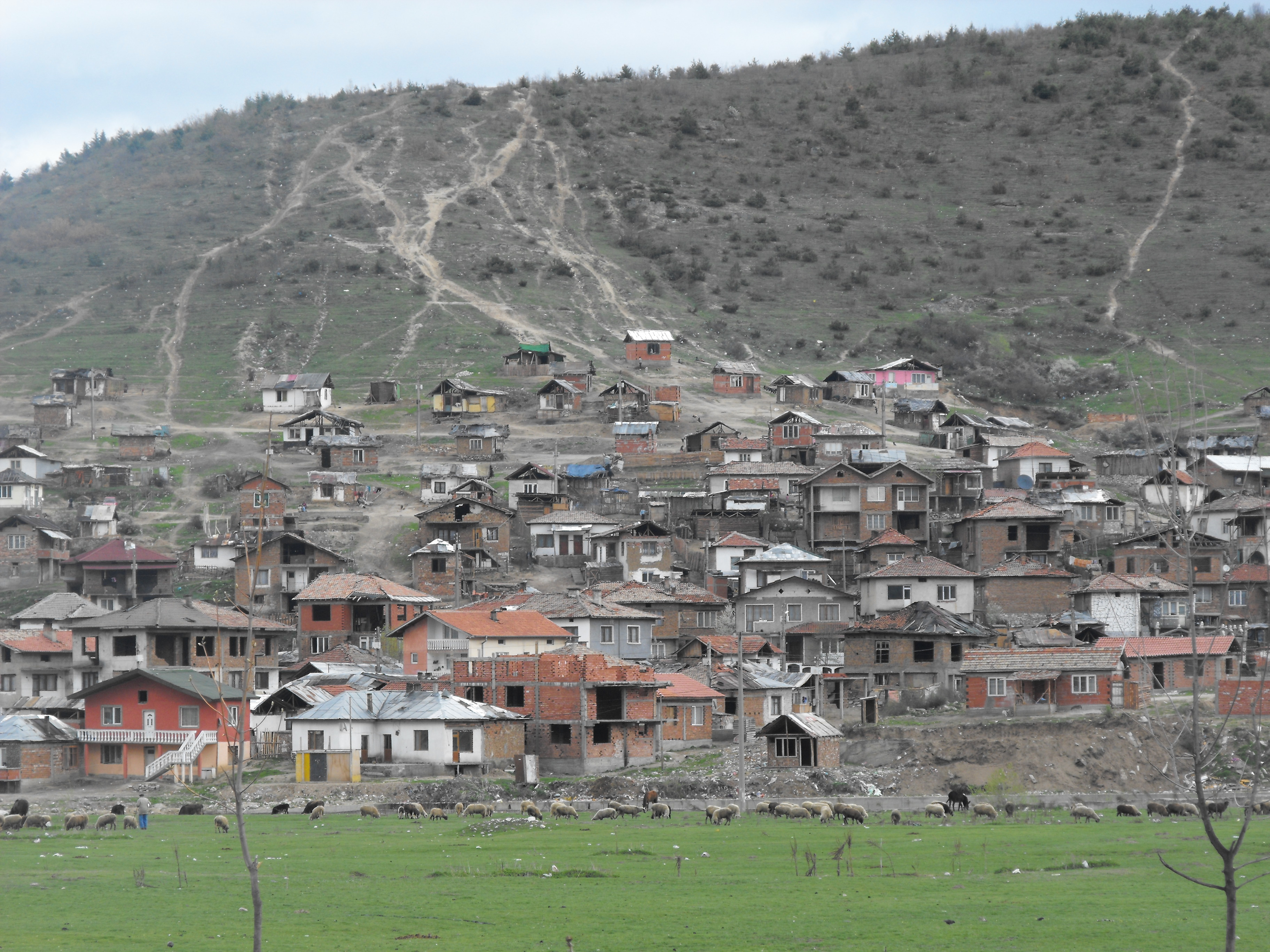 Циганско гето - Велинград